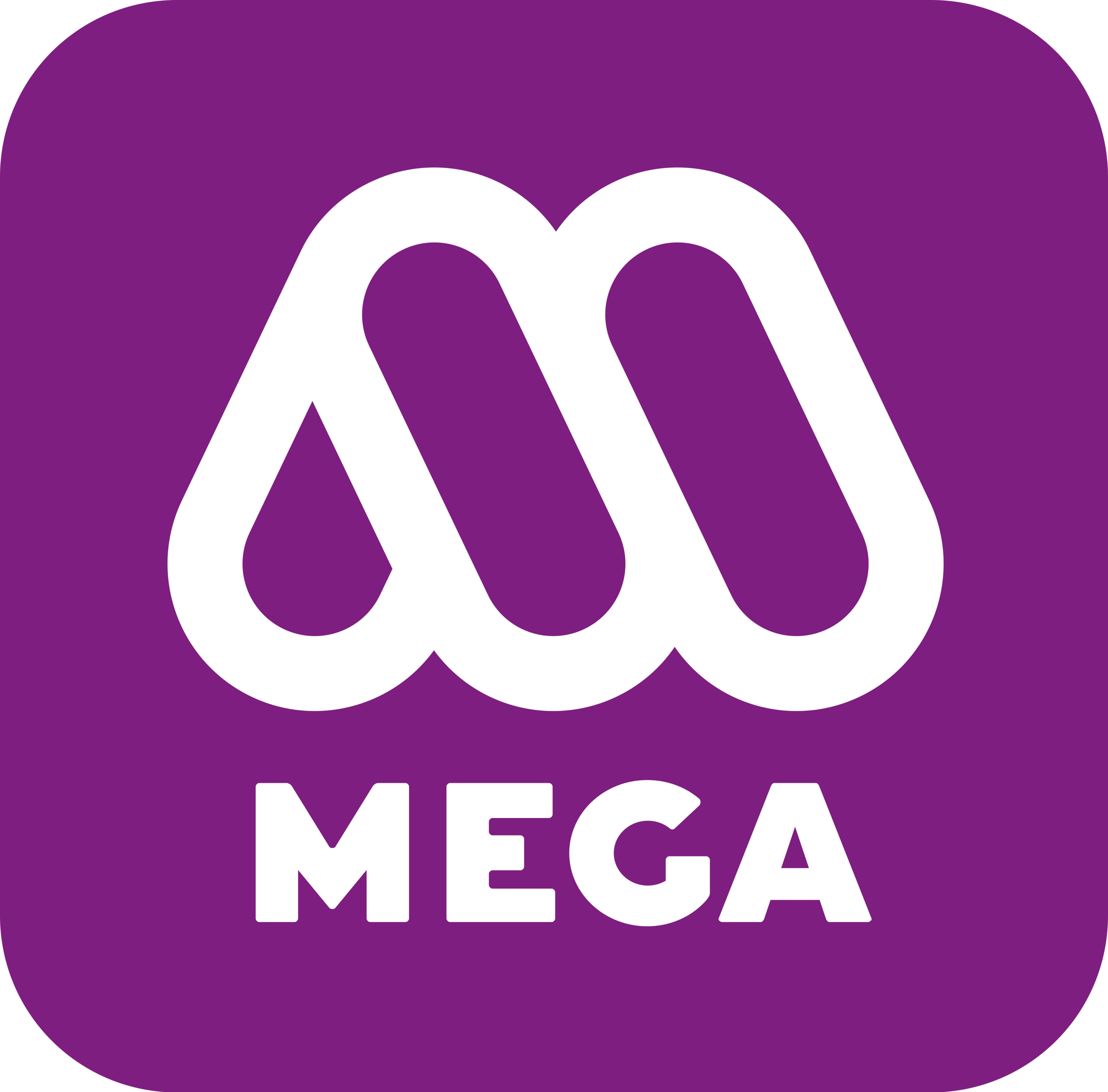 Logotipo de Red Televisiva Megavisión de 2015